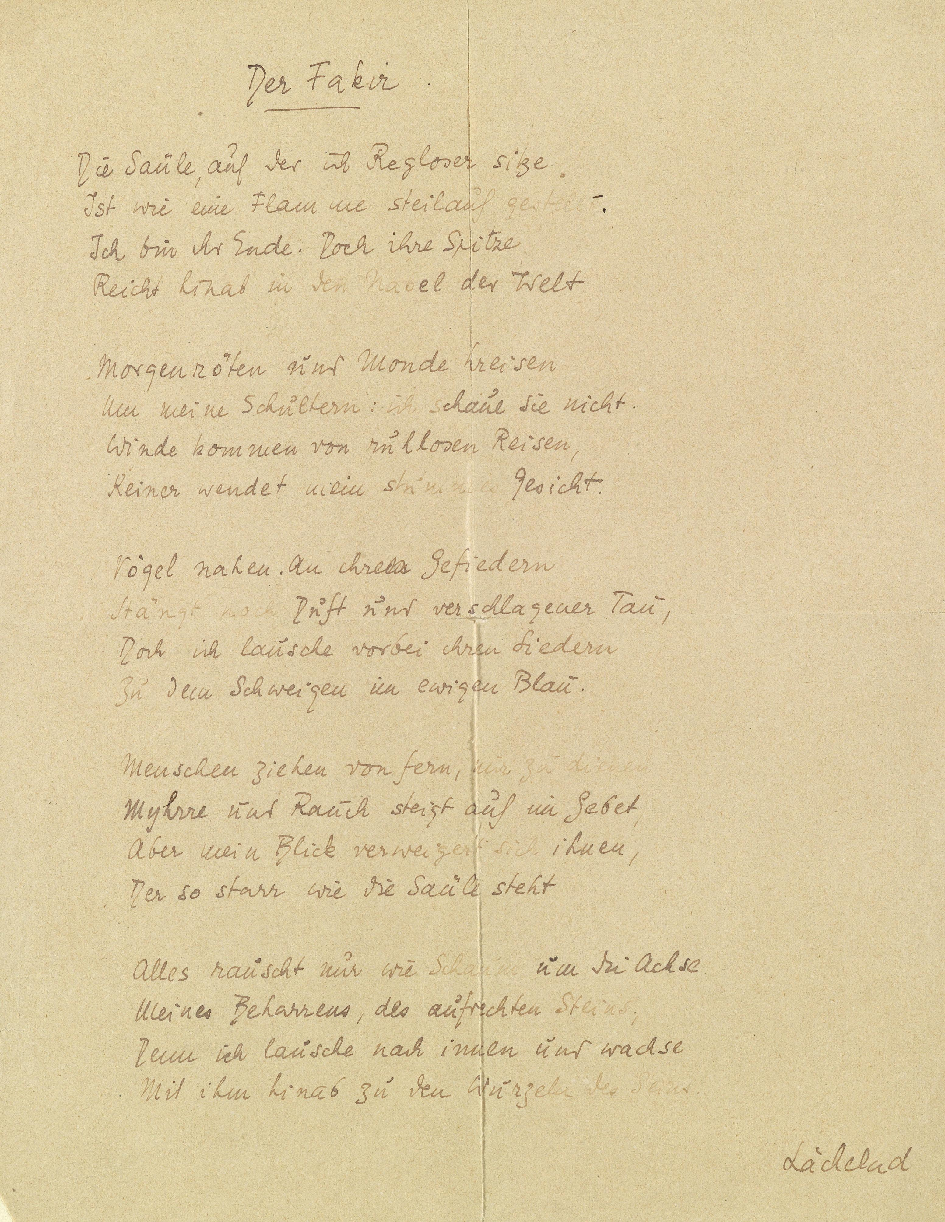 Gedichtmanuskript "Der Fakir", Seite 1 von 2, Reinschrift aufgrund eines Begleitschreibens um 1907–1916 zu datieren; das Gedicht erschien bereits 9101 in Buchform in der Sammlung "Silberne Saiten"